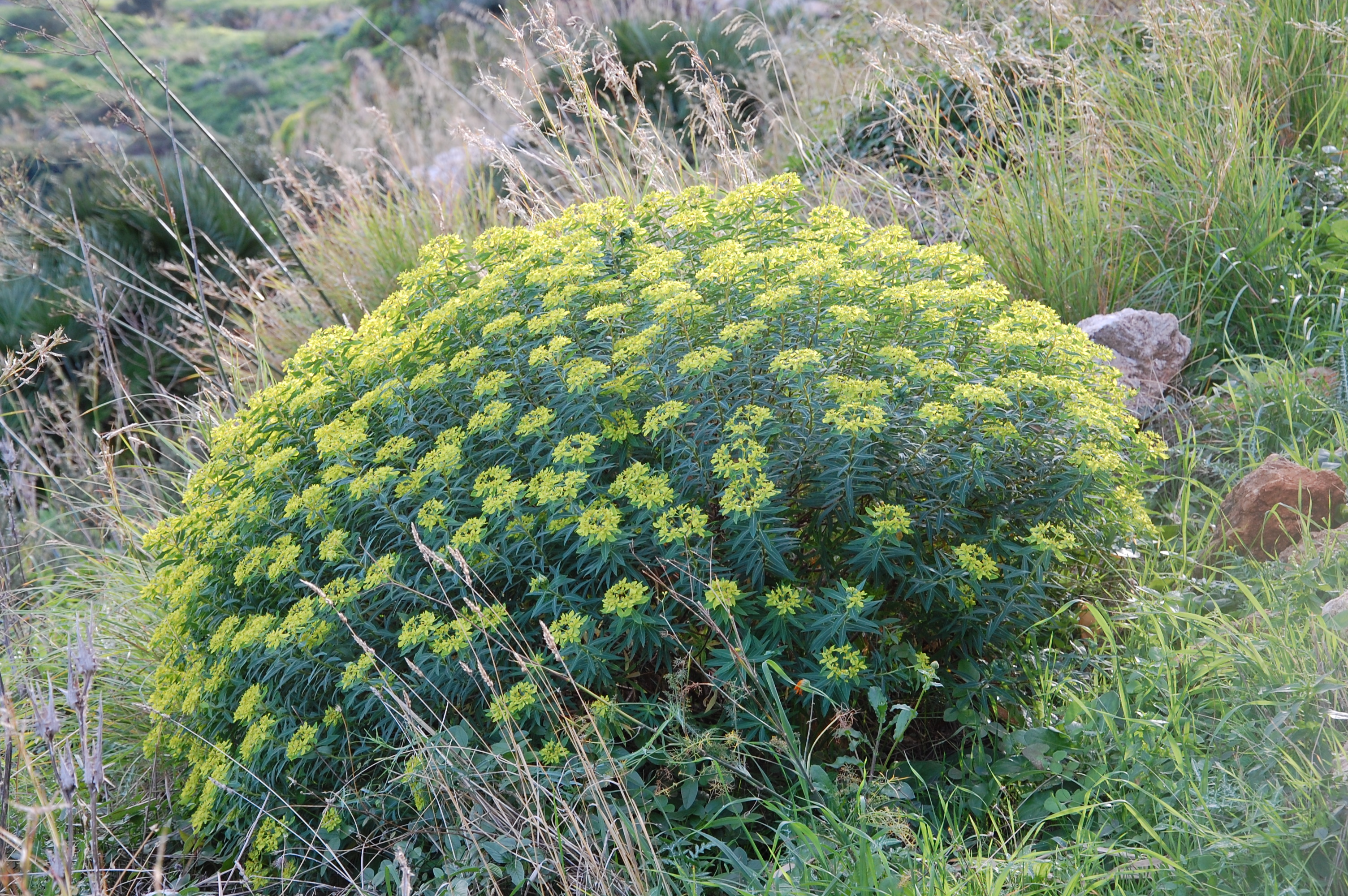 Euphorbia dendroides Zingaro, Sicily